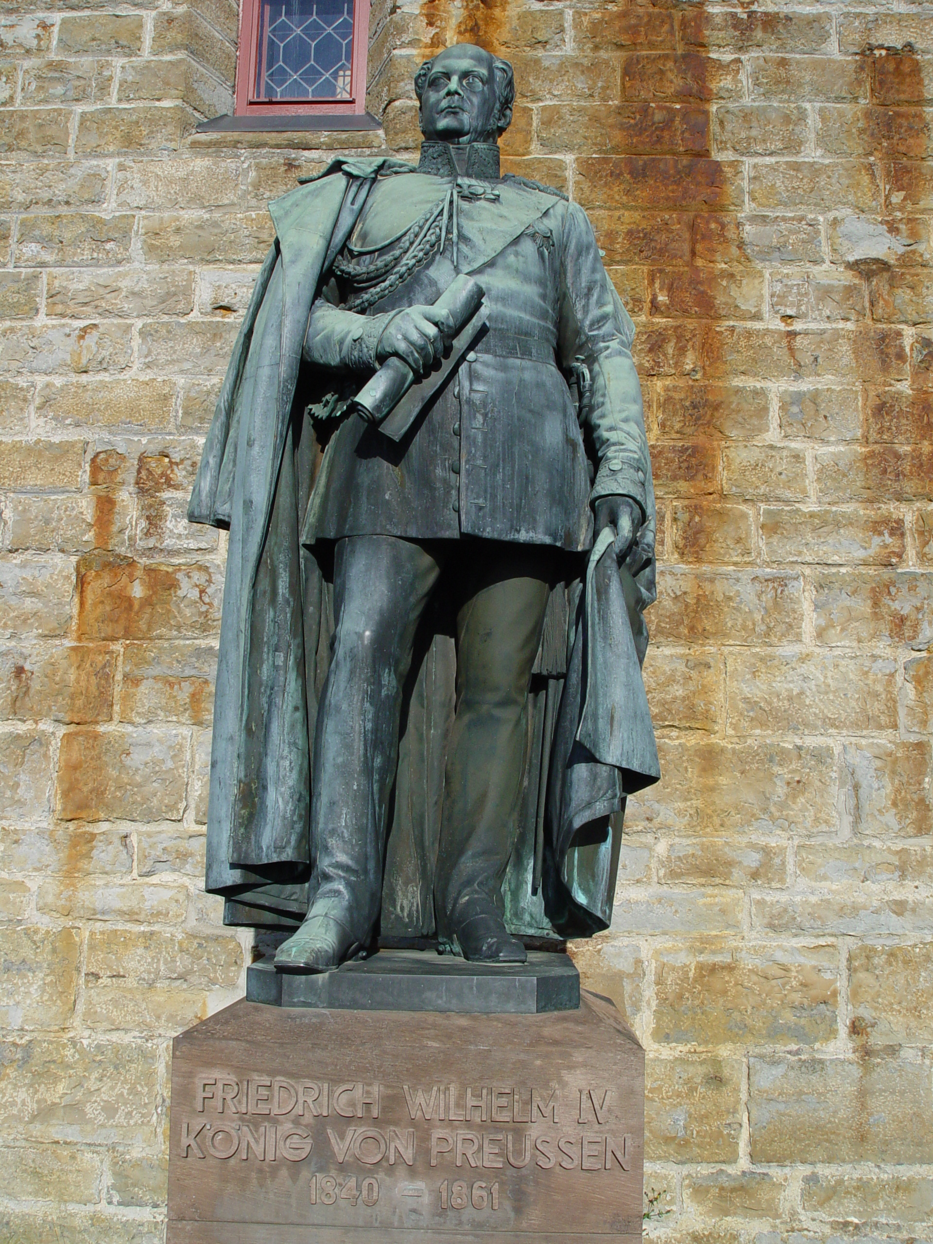 Statue von Friedrich Wilhelm IV.von Carl Schuler heute auf der Burg Hohenzollern (früher: Ruhmeshalle Berlin)